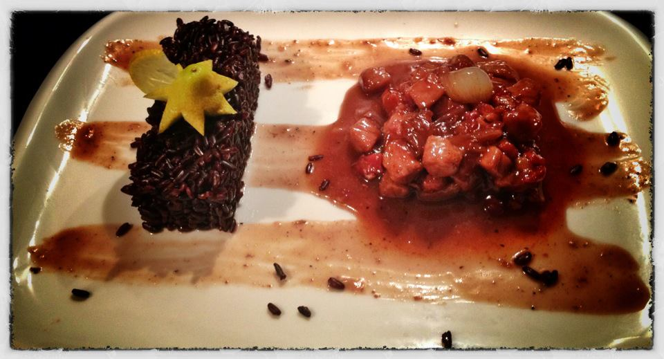 Porc fermier des Alpes de Haute Provence au miel de Lavande sublimé par son riz noir du Piémont aux saveurs citronnées